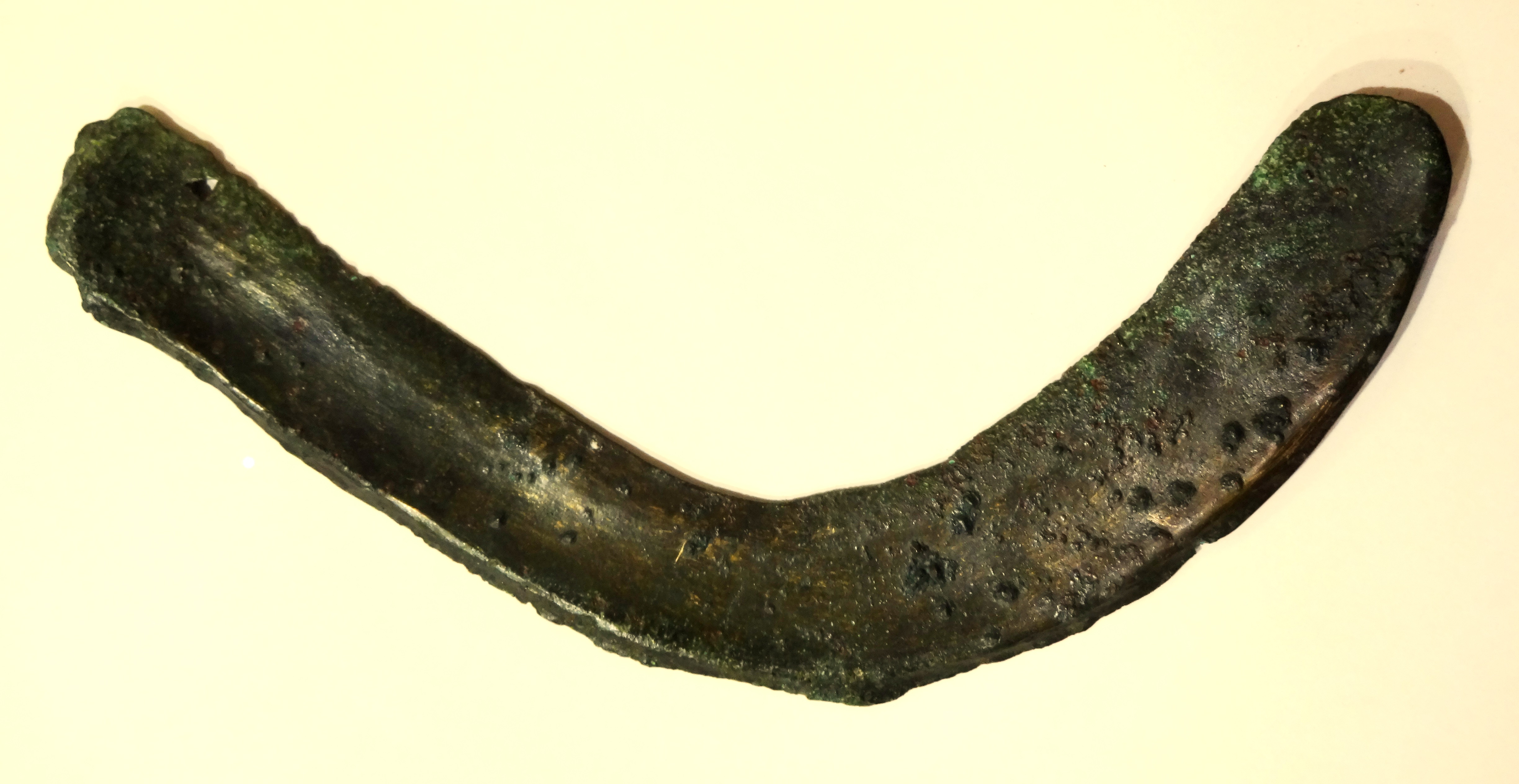 bronzezeitliche Sichel ohne Griff aus Hort in Ungarn